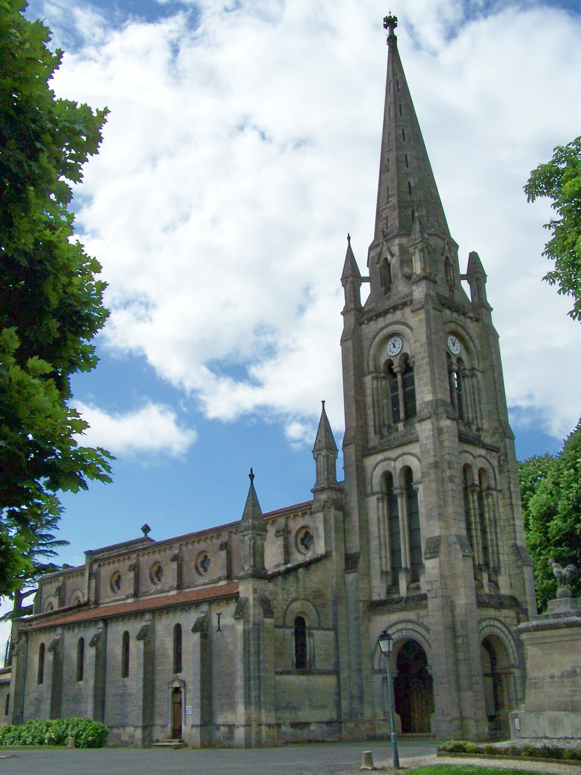 Église de Sainte-Croix-du-Mont, Gironde, France